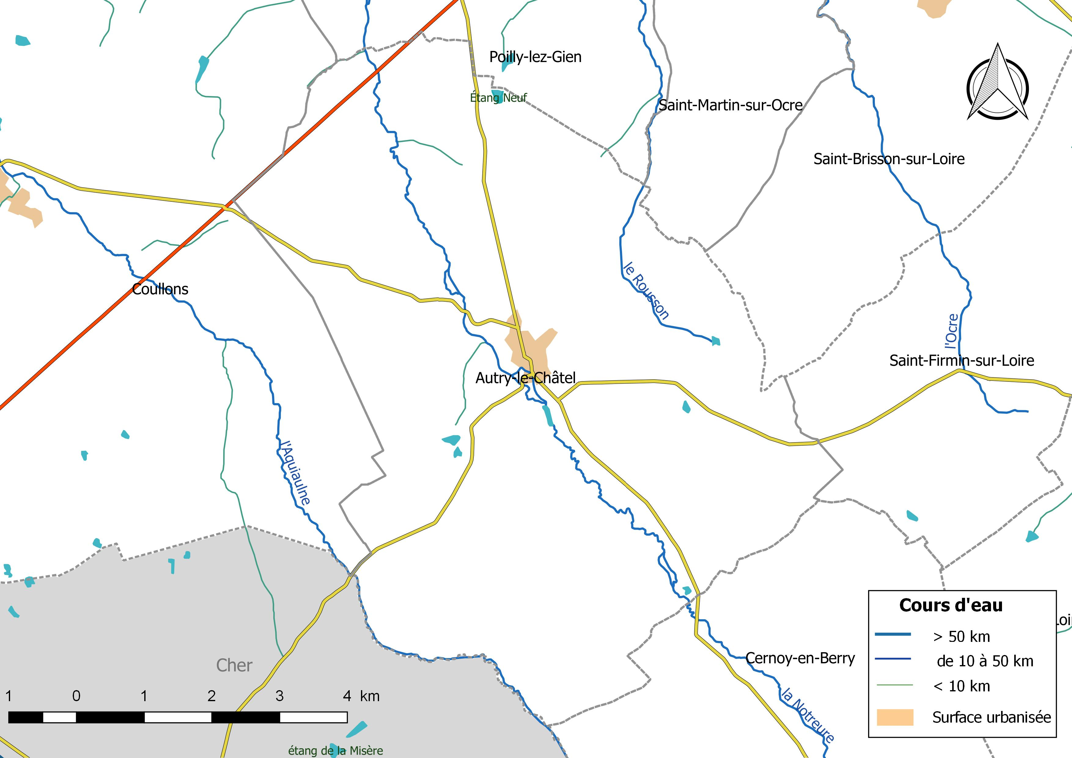 Carte du réseau hydrographique de la commune de Autry-le-Châtel (France).